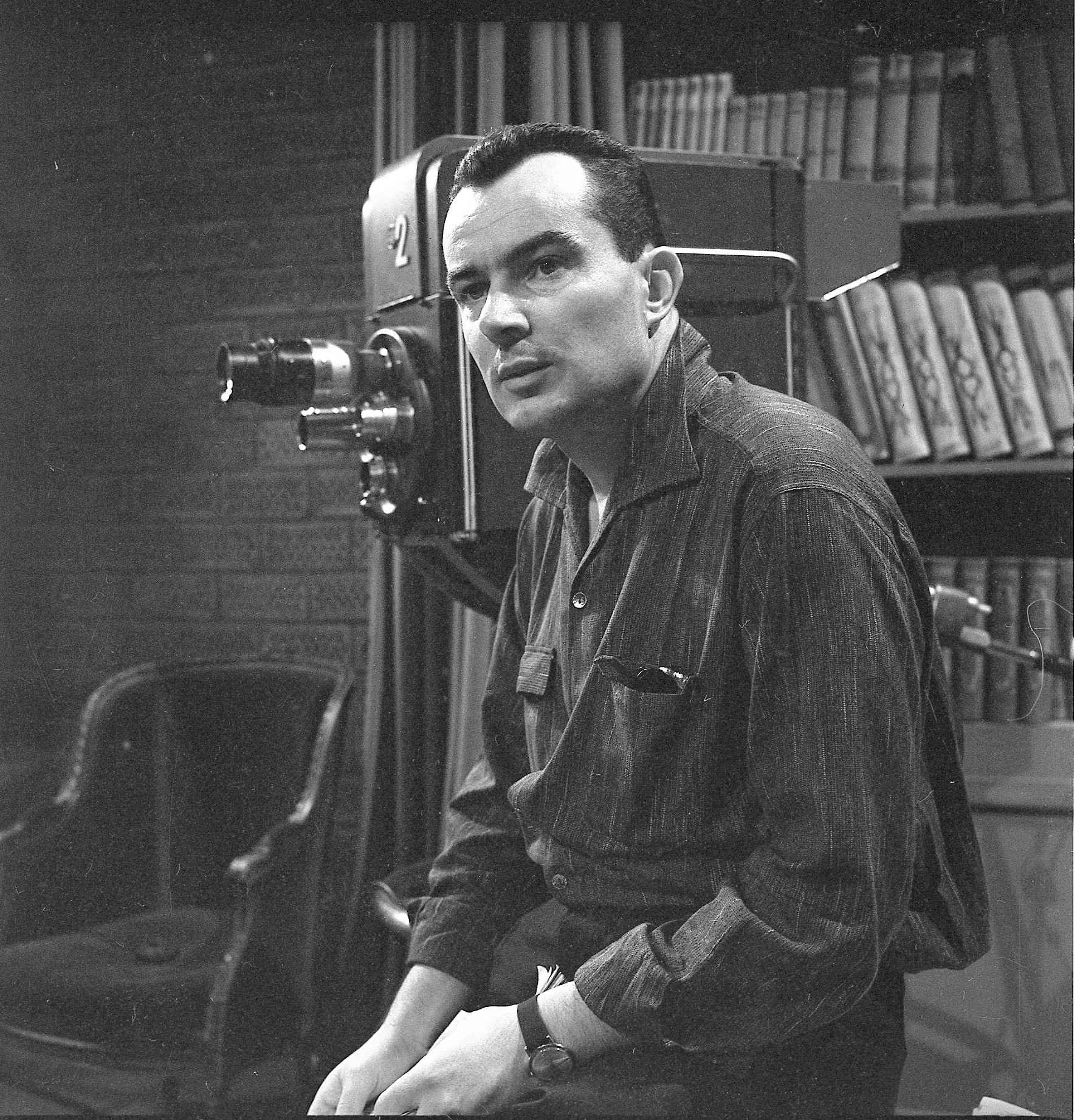 Sava Mrmak, 1963. Foto:Stevan Kragujević (po odobrenju kćerke Tanje Kragujević)